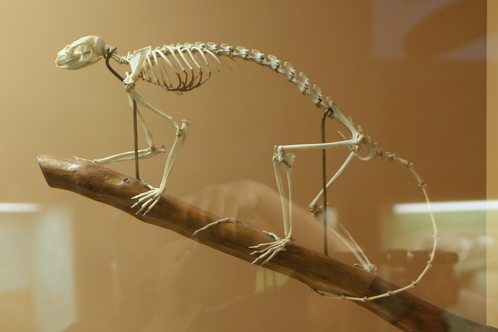 Petauroides volans skeleton